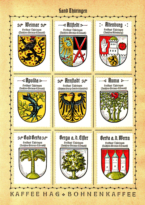 Beispiel für das Aussehen der Wappensammelblätter innerhalb der Bände der Neuen Reihe von 1925 der Firma Kaffee HAG